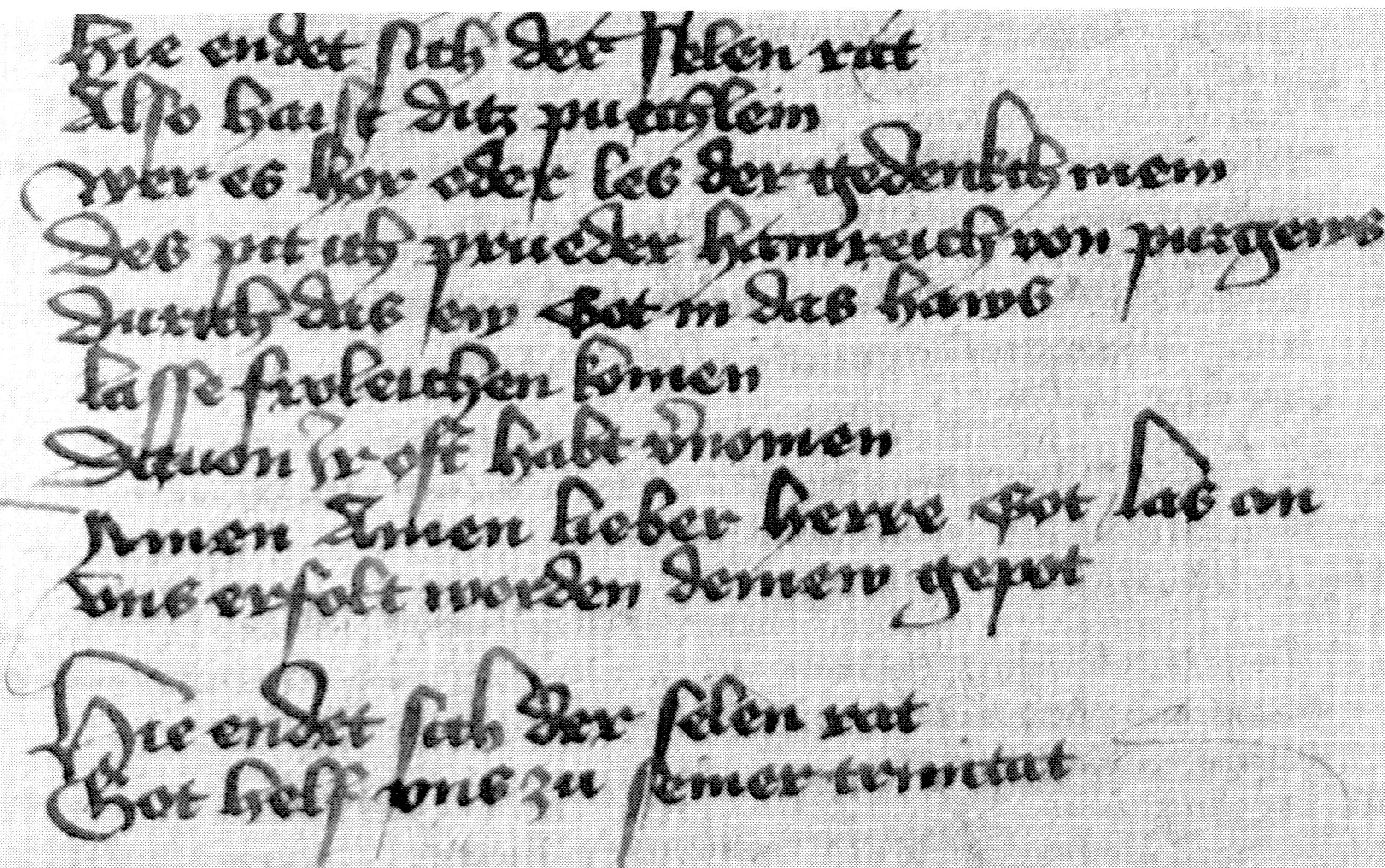 Heinrich von Burgeis: Der Seele Rat, Brixen, Priesterseminar, Cod. R 7